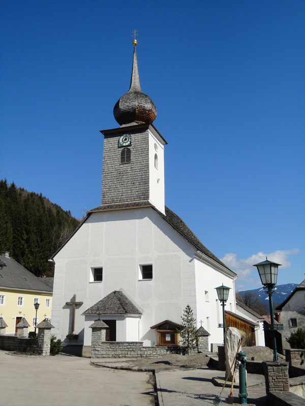 Denkmalgeschützte Kirche im Ortsteil Assach der Gemeinde Aich.